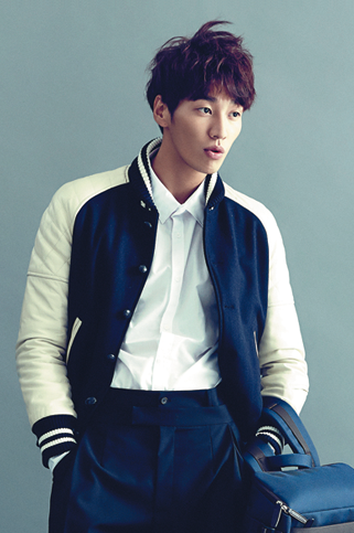 빈폴액세서리 싱글즈 화보 촬영 현장